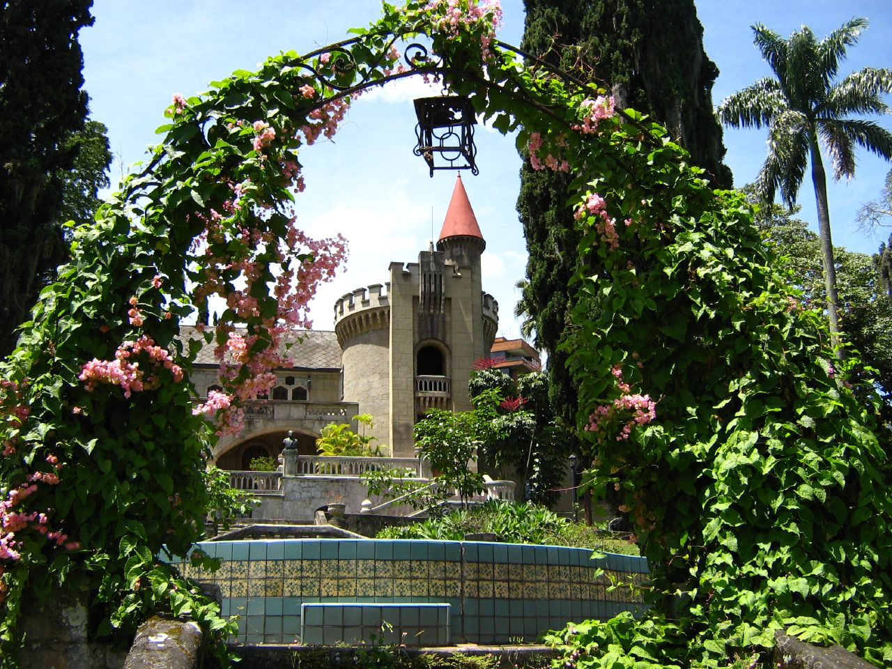 Museo El Castillo en la ciudad de Medellín, Colombia.Museo el Castillo Medellin